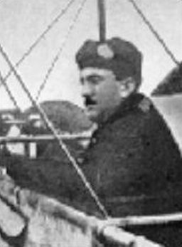 Adorján János (1882–1964) magyar gépészmérnök, a hazai repülés jelentős úttörője